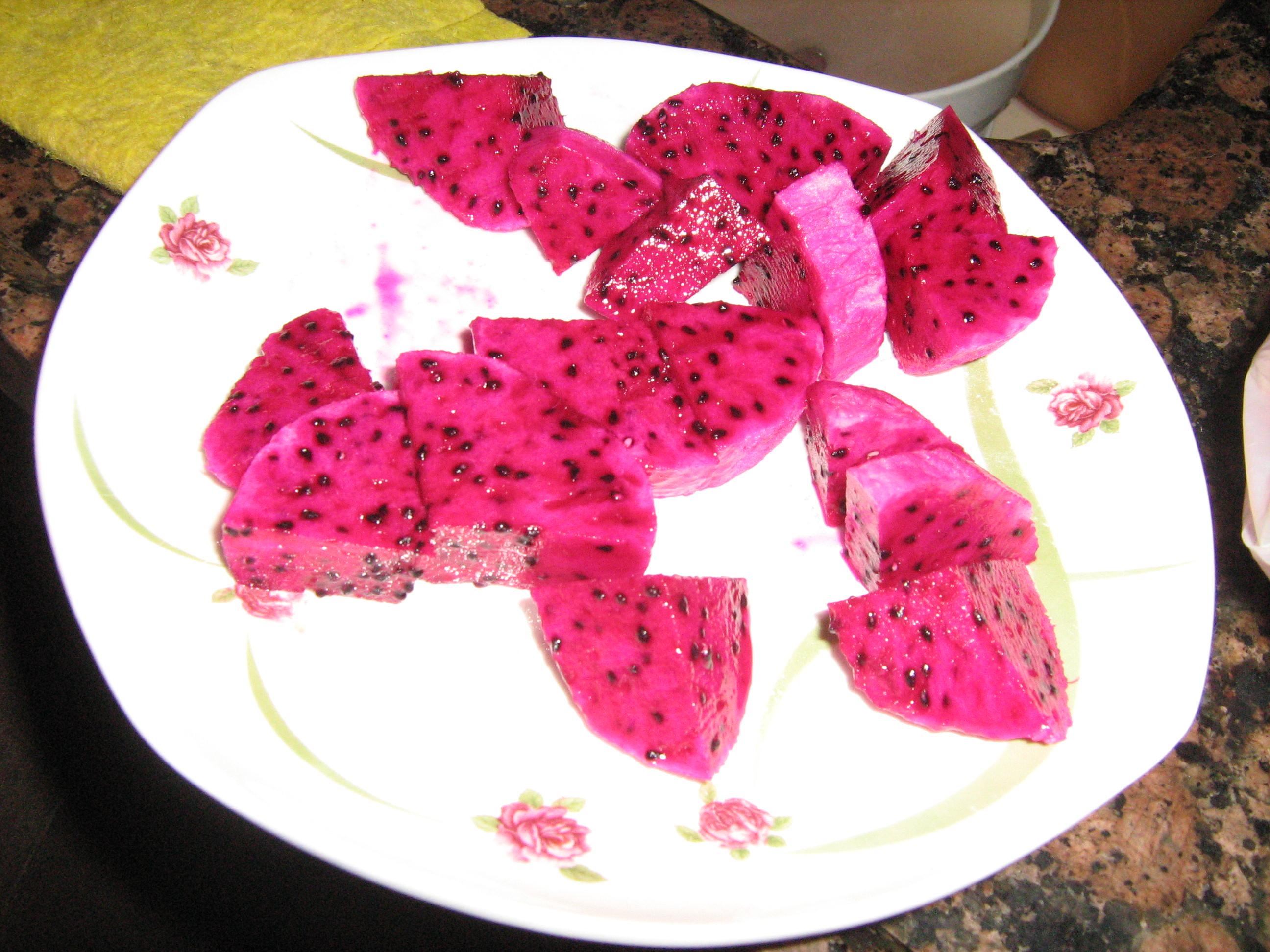 Pitaya